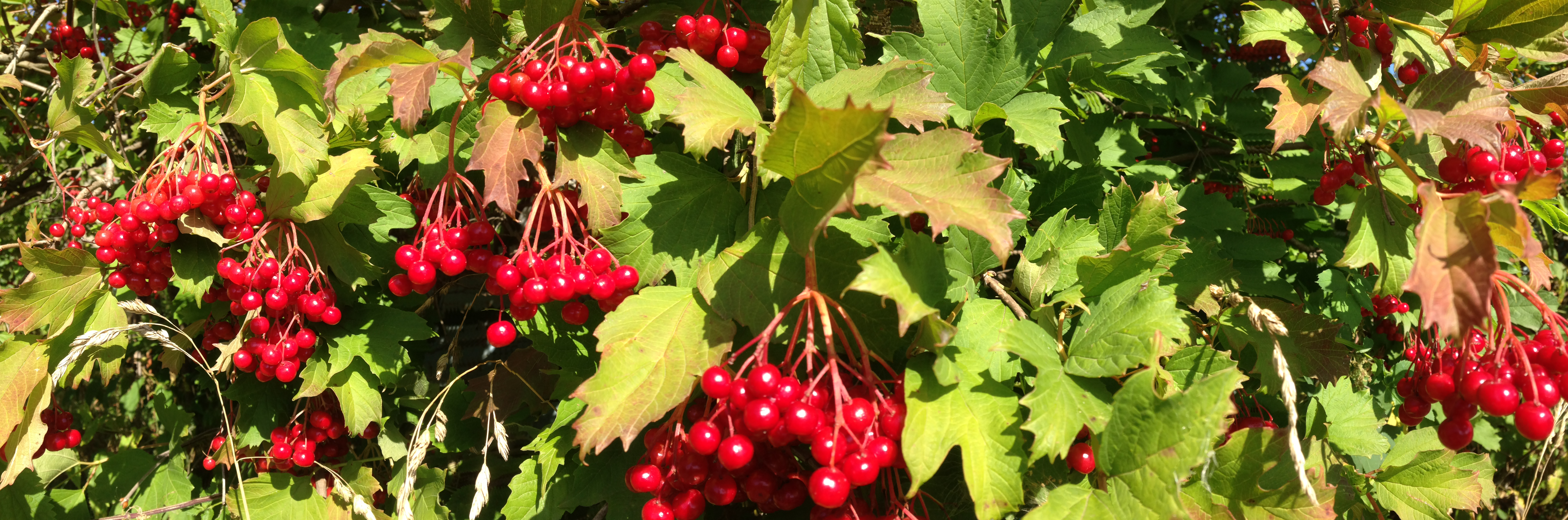 Кусты калины